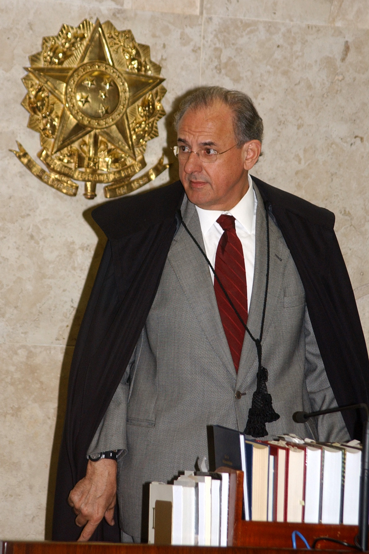 Presidente do STF do Brasil, Nelson Jobim Data: 07/08/2004 Autor e Fonte: STF - Supremo Tribunal Federal [1] OBS: As fotos do STF podem ser usadas gratuitamente, devendo se dar os créditos devidos ao STF.